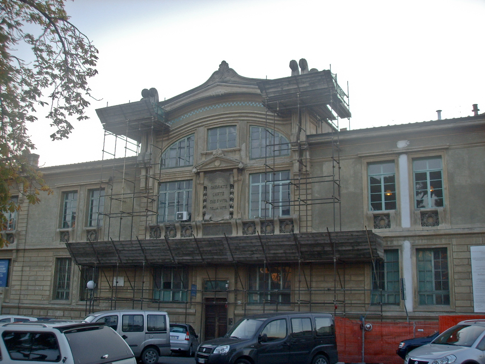 Galleria Rinaldo Carnielo in Piazza Savonarola, Florence